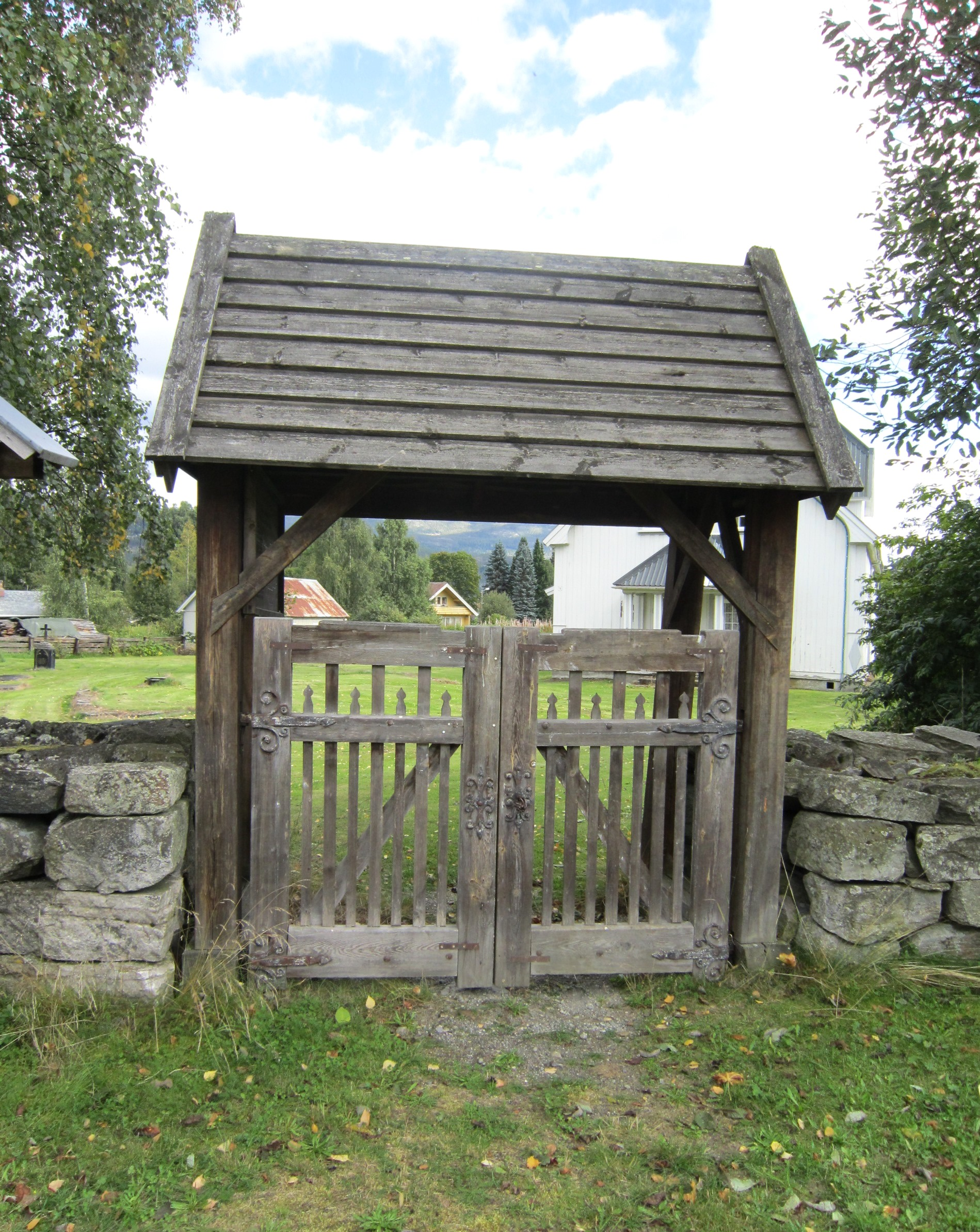 Nes gamle kirkegård (Nesbyen i Hallingdal)